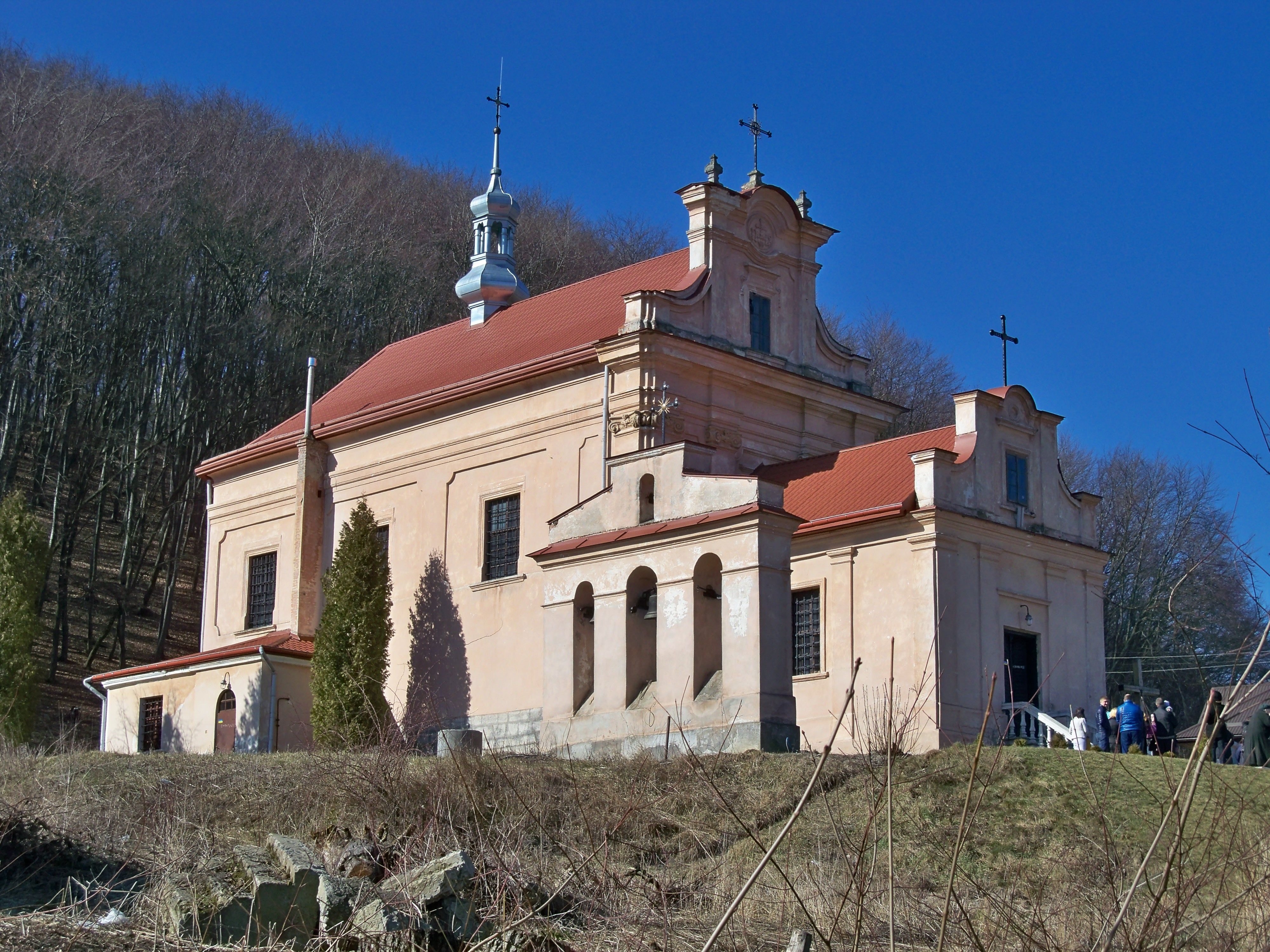 Костел [В]Небовзяття Пресвятої Діви Марії, Винники